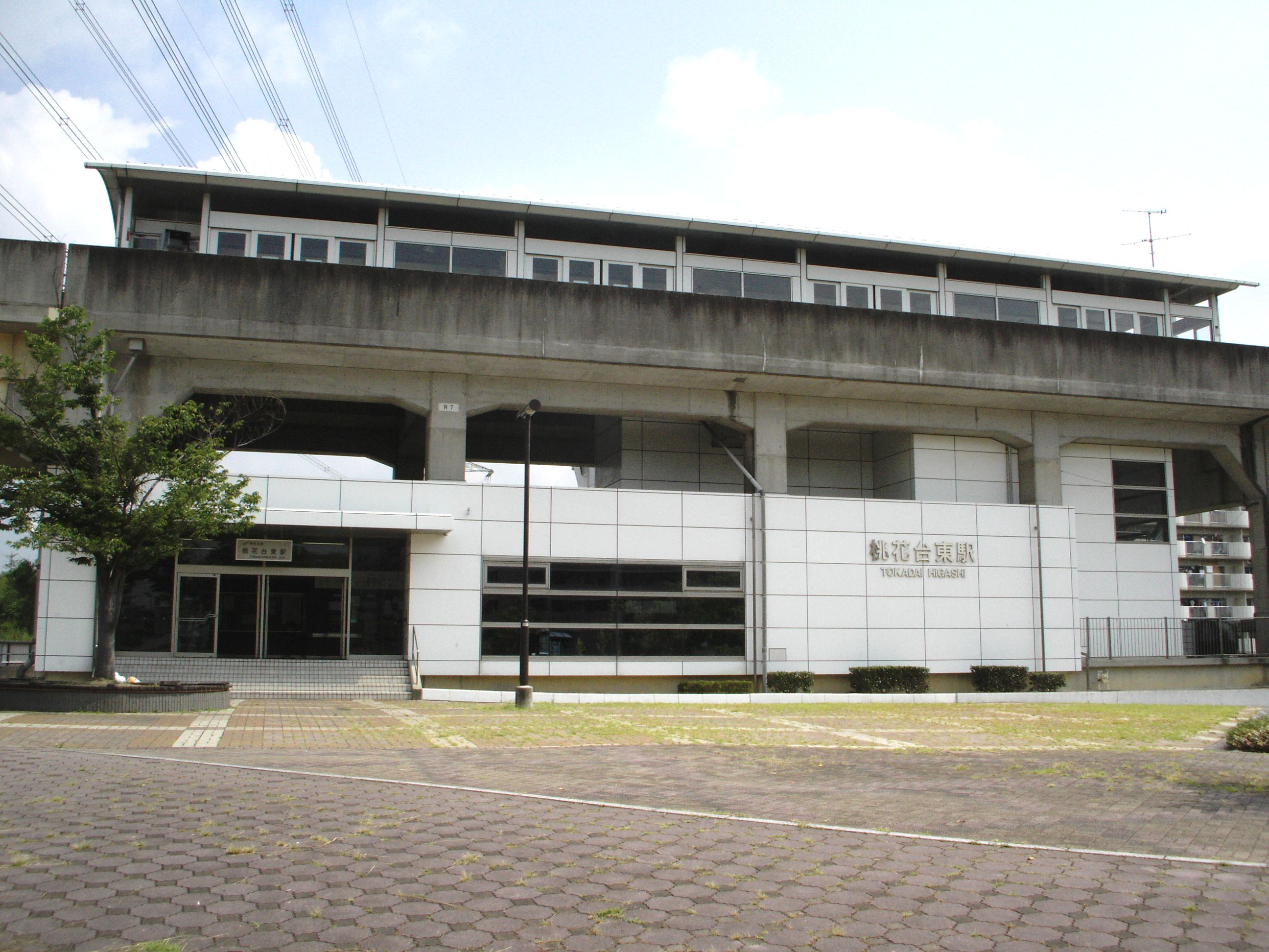 桃花台東駅